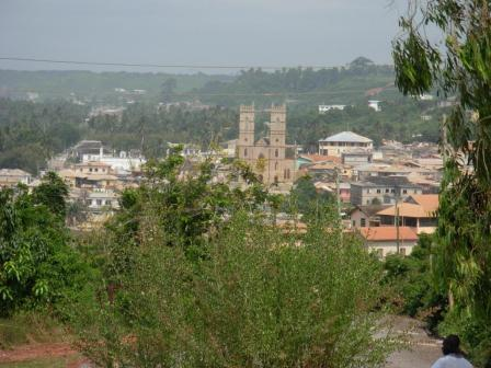 Saltpond (Central Region, Ghana) mit der Wesleyanischen Kirche